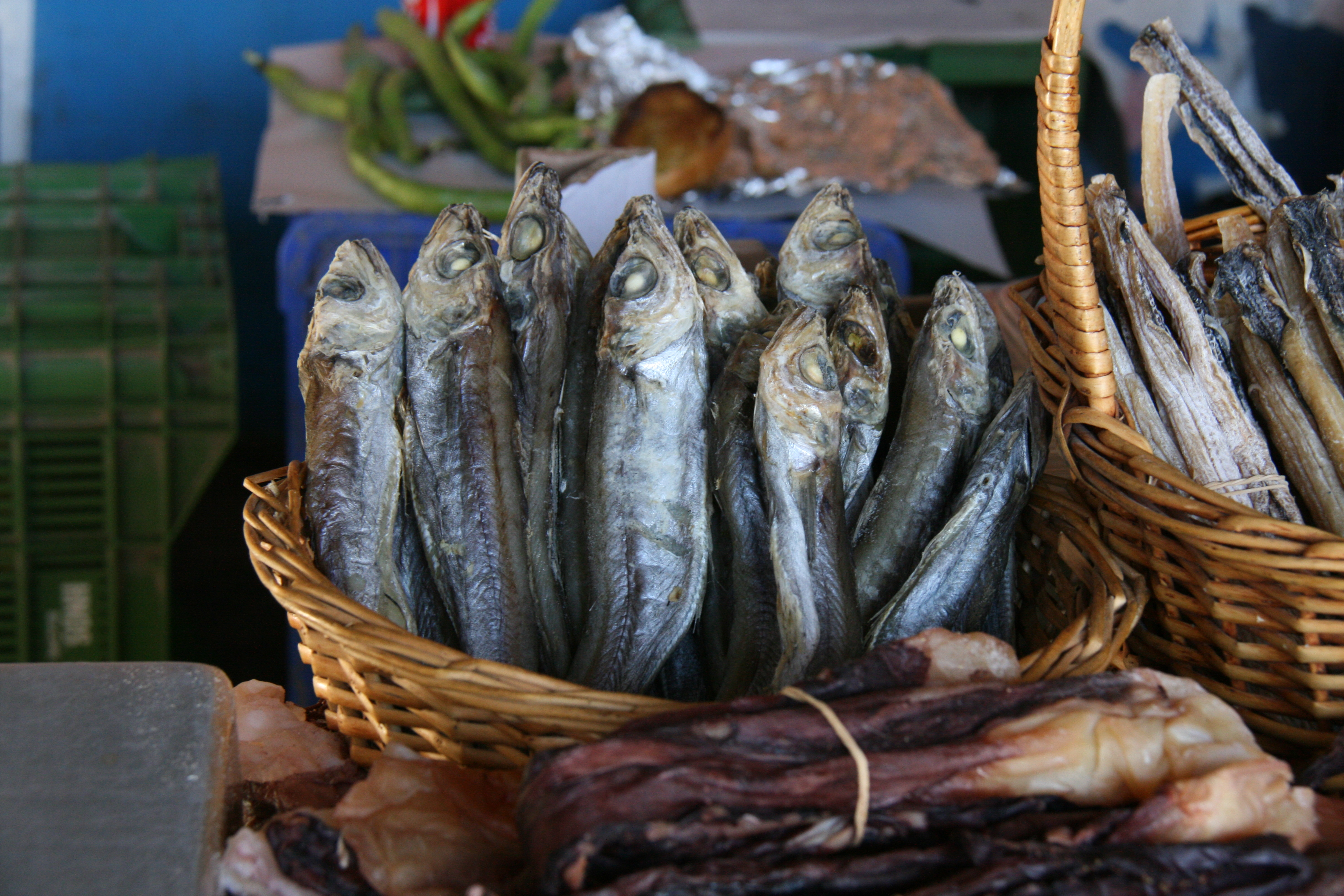 Capellanes - alicante